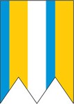 Vlajka obce Sedlice sken